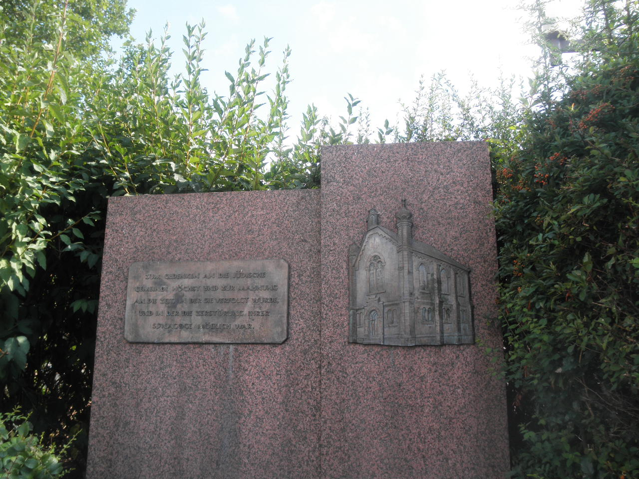 Montmelianer Platz en Höchst im Odenwald, memorejo pri la eksa sinagogo